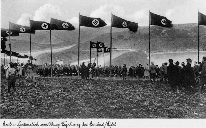 Erster Spatenstich von Burg Vogelsang bei Gemünd / Eifel